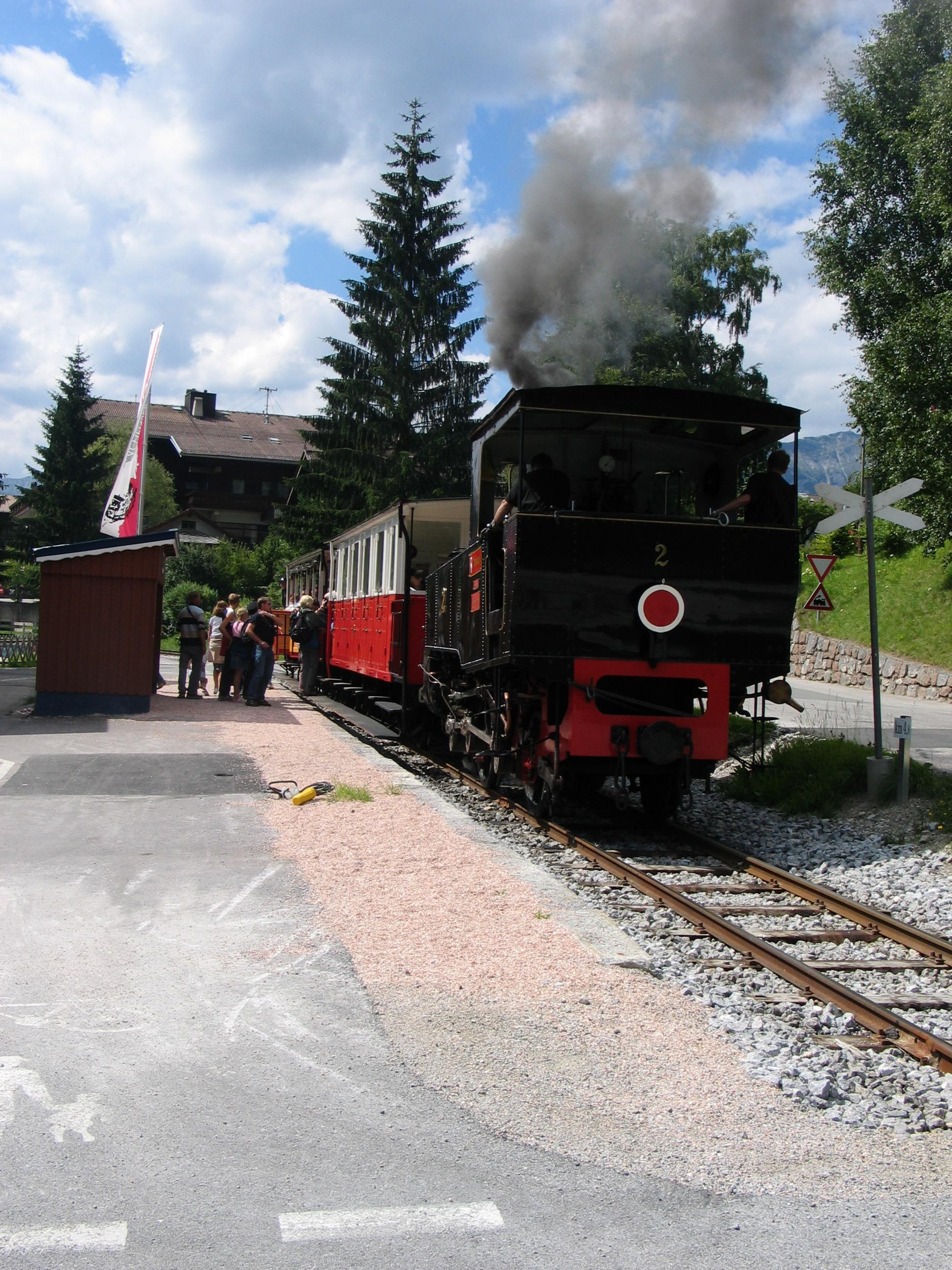 Achenseebahn an der Haltestelle Maurach. (Ende der Zahnstange ist im Bahnhof Eben)